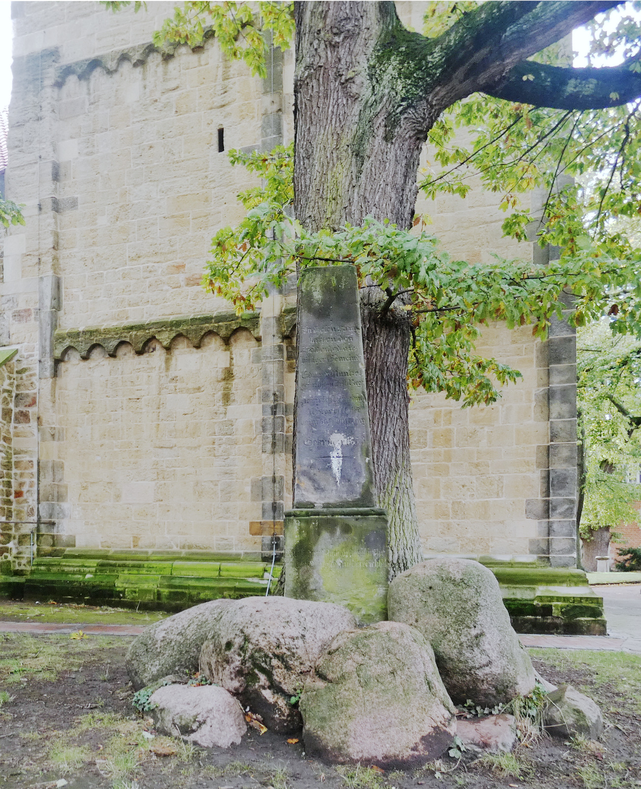 Das Kriegerdenkmal in Gehrden für den Krieg von 1870/71. Im Hintergrund der Turm der Margarethenkirche